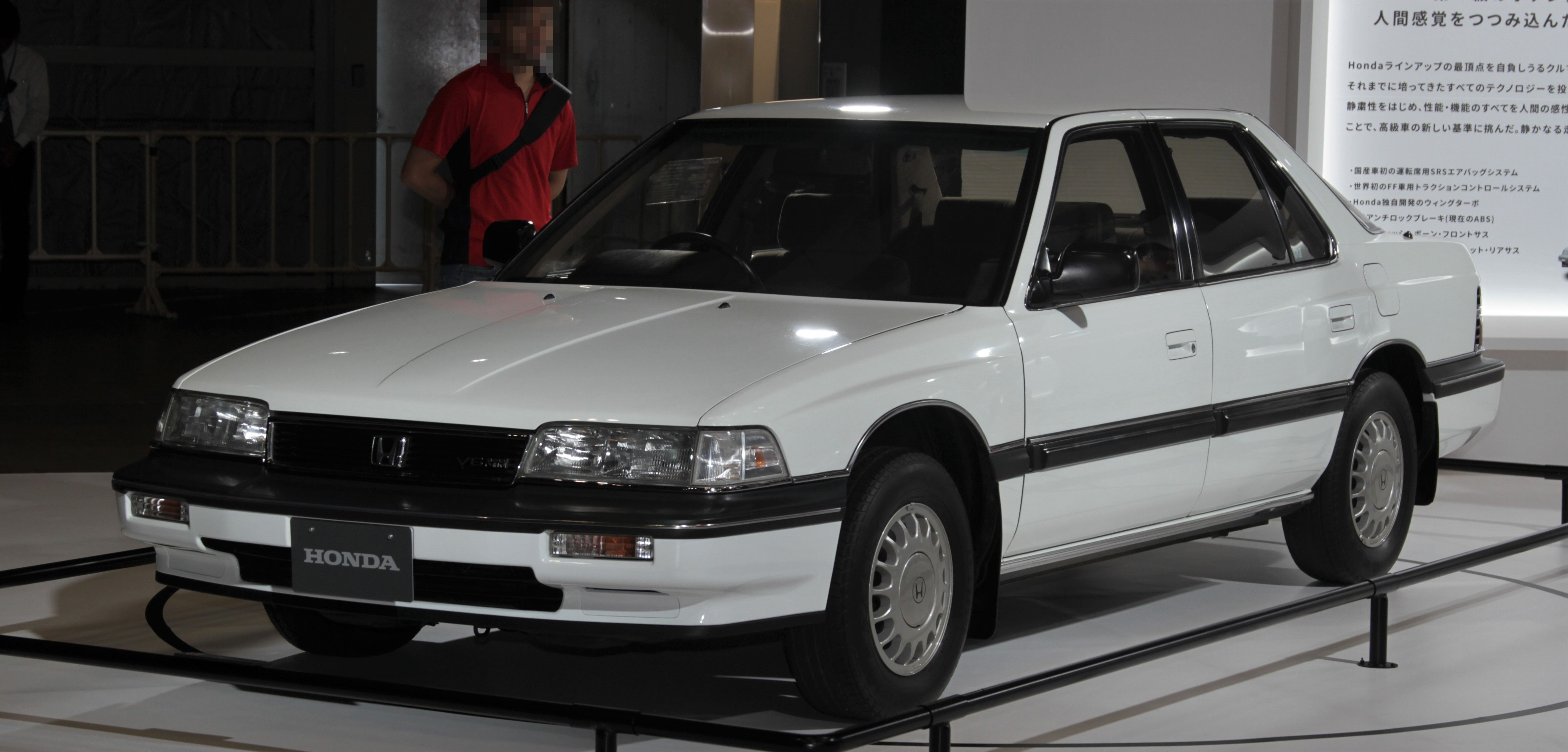 1st generation Honda Legend